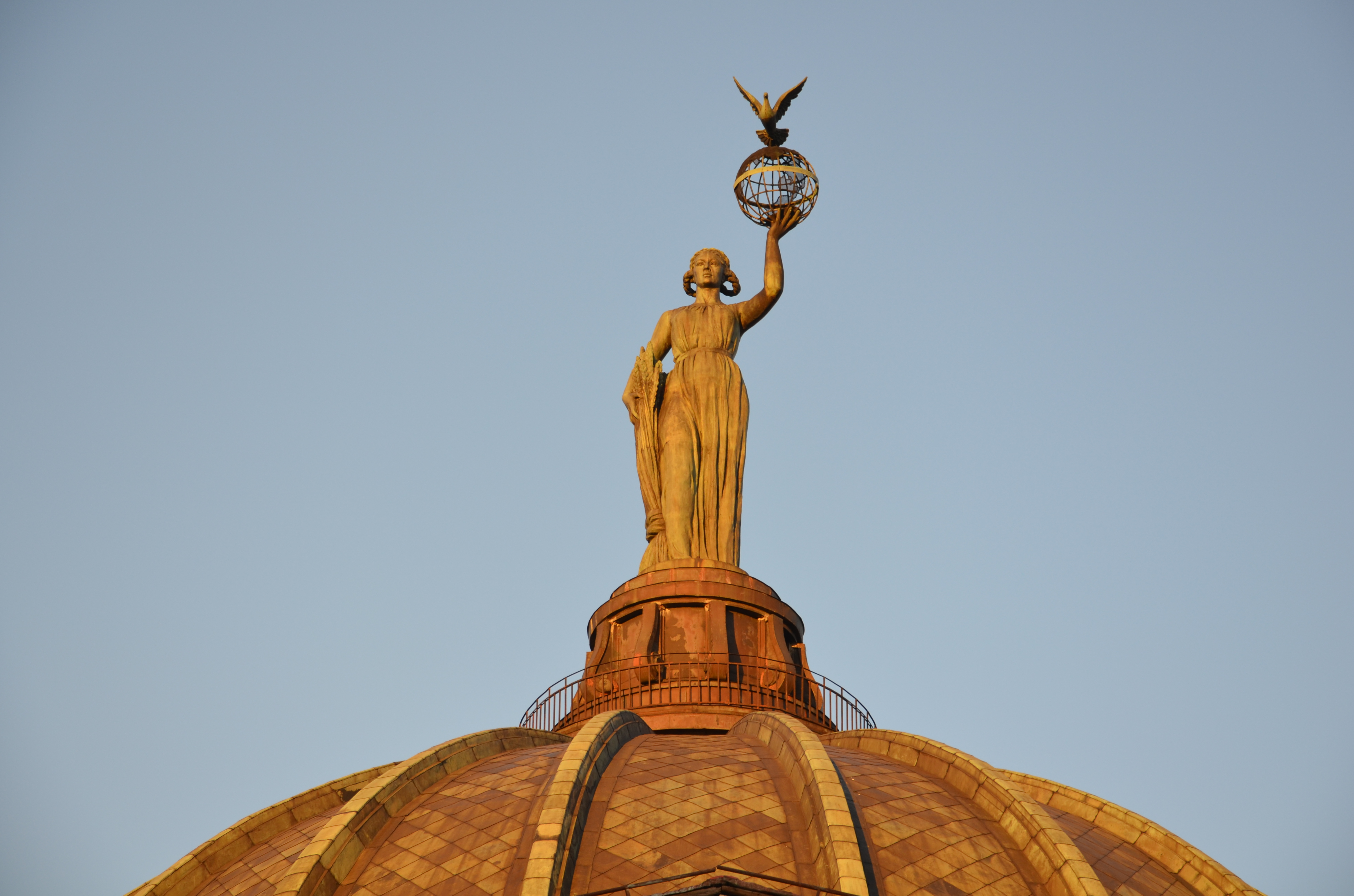 (Волгоградская область, Волгоград, Гагарина улица, 14)